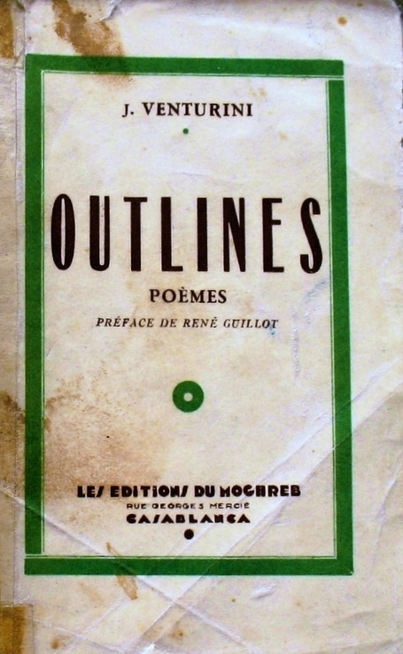 Couverture de l'édition originale (1939) d’Outlines, recueil du poète Jean Venturini.